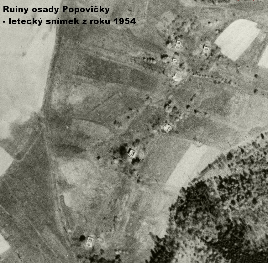 Ruiny osady Popovičky - let. snímek 1954